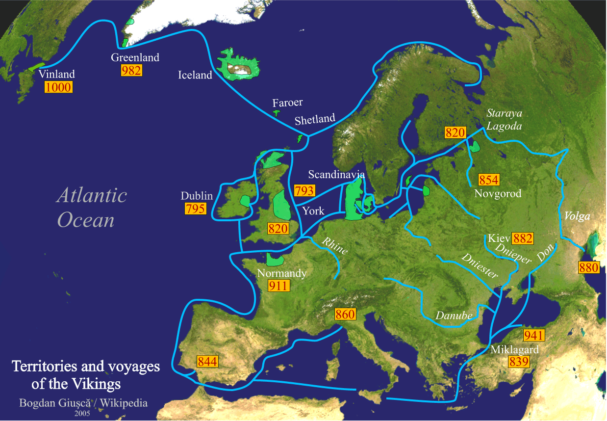 Territoires et expéditions vikings (image commons modifiée)